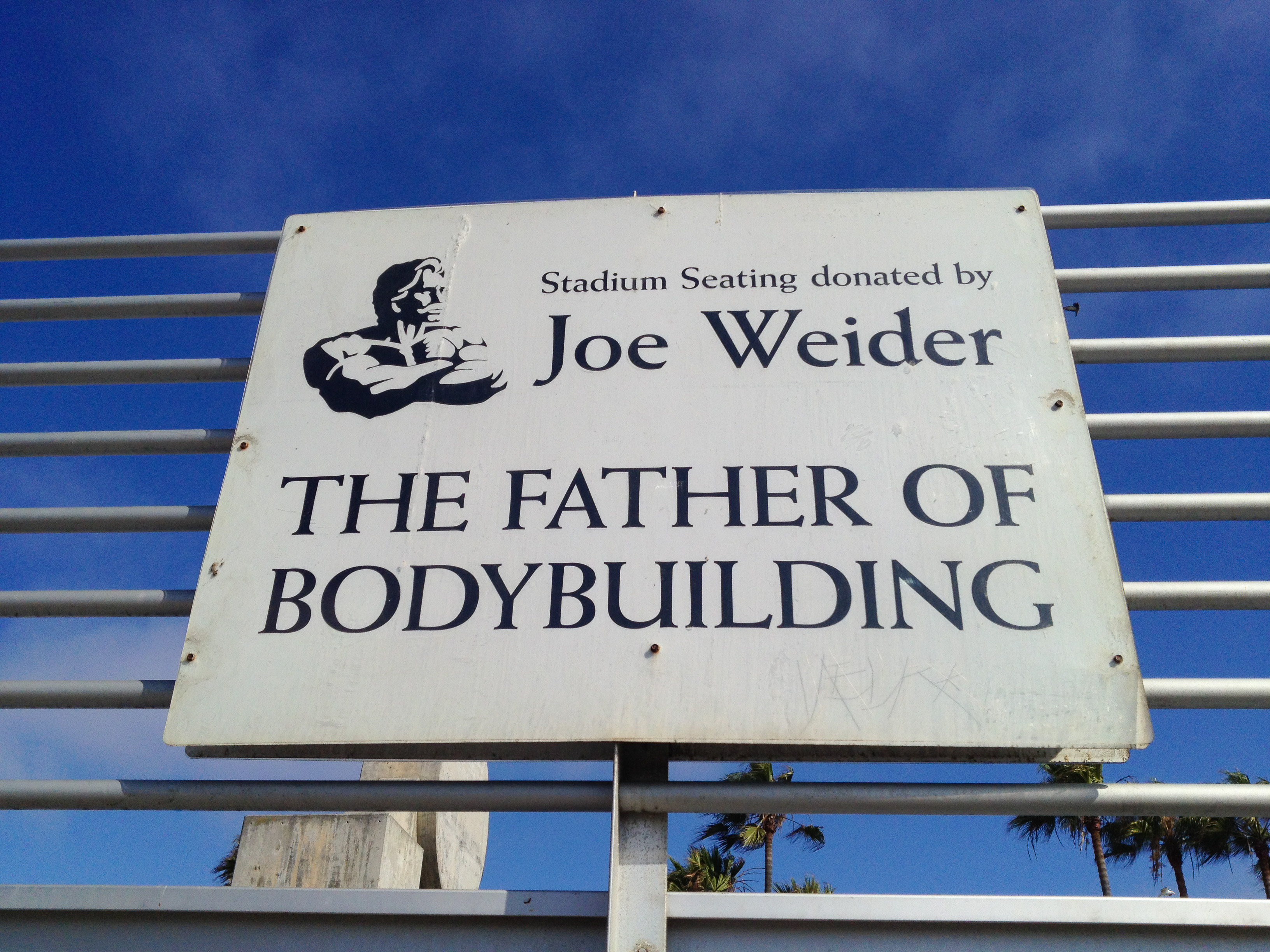 Venice beach Joe Weider in LA